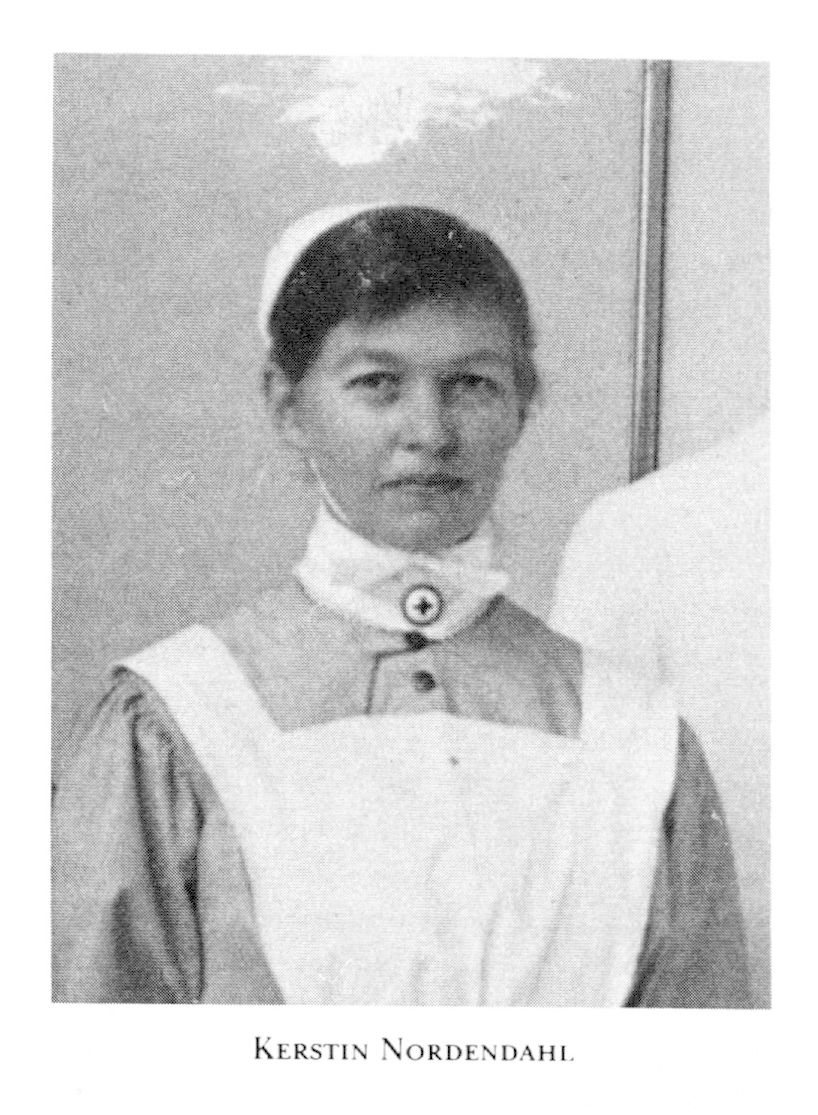 Kerstin Nordhendahls porträtt från okänt ursprung.